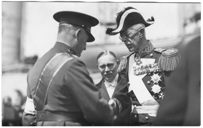 Rootsi kuninga Gustav V külaskäik Eestisse